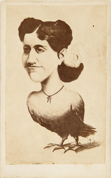 Carte de visite. Caricatura de Adelina Patti.